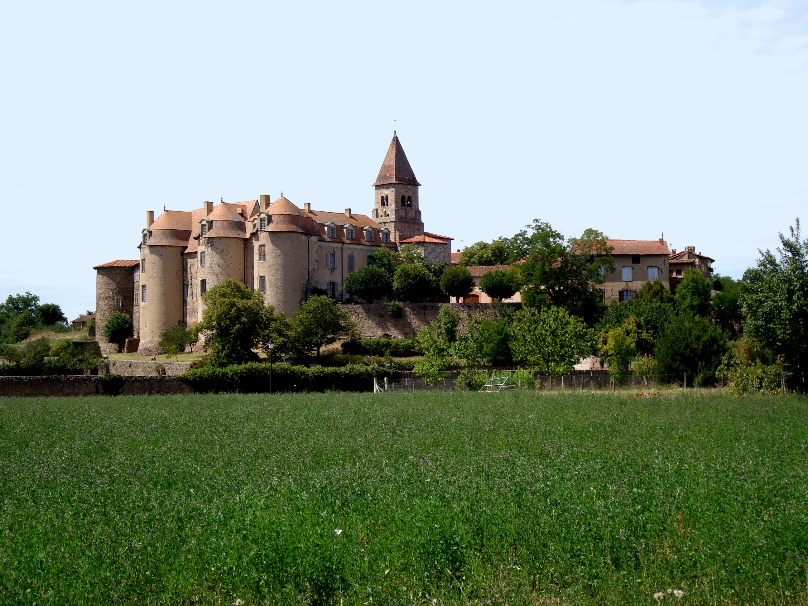 Le prieuré de Pommiers (Loire).